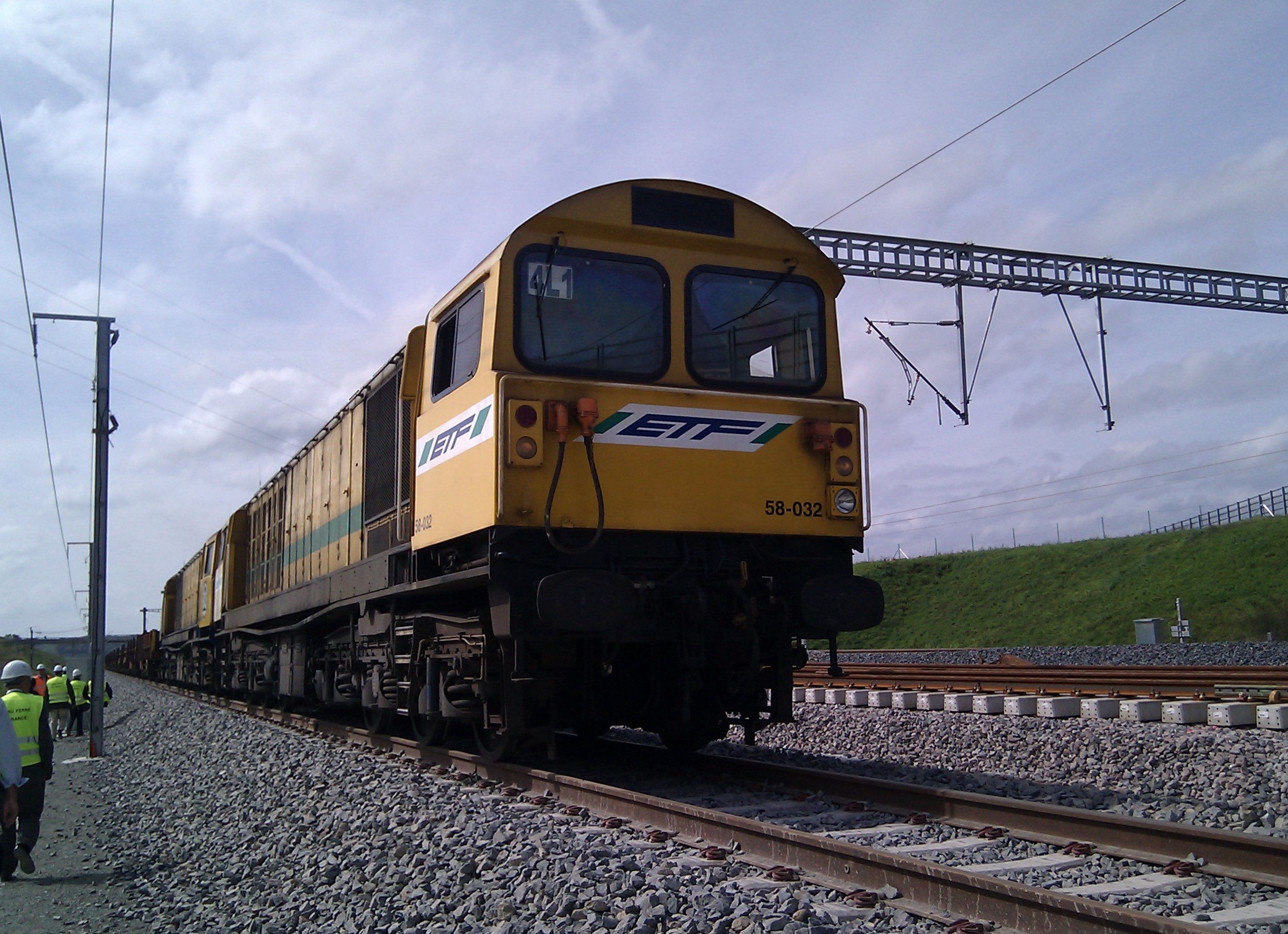 Locomotive Class 58-032 de l'entreprise ETF en tête d'une unité multiple à la traction d'un train de longs rails soudés (LRS) sur le chantier de la LGV Rhin-Rhône (branche est) au niveau de la future gare de Belfort-Montbéliard-TGV (Meroux)